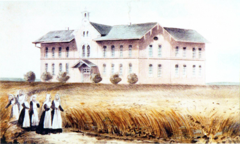 Kolorierte Lithographie des Mutterhauses der Diakonissenanstalt Neuendettelsau (Das Bild muss zwischen 1855 und 1858 entstanden sein: 1855 kam es zu dem auch auf der Lithographie abgebildeten Anbau des Ostflügels, 1858 wurden die Schleier der auf der Zeichnung abgebildeten Diakonissen durch die Haube ersetzt).